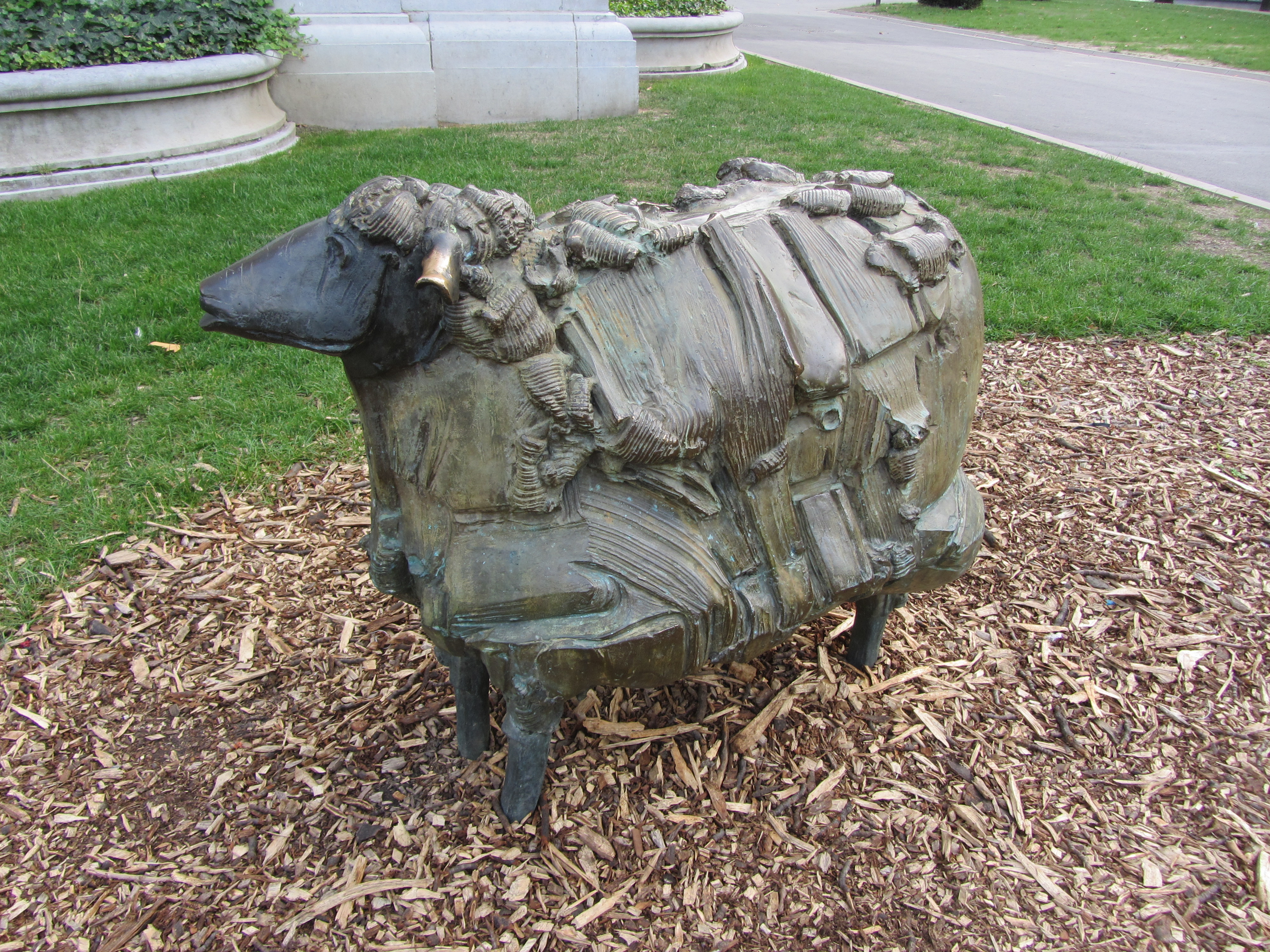 "Le mouton" 1988, sculpture de Pierre Petry, bronze, Parc de la Boverie, Liège, Belgique